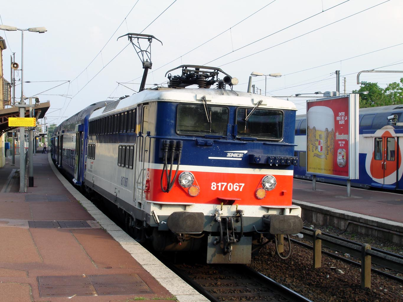 Gare de Saint-Leu-la-Forêt (Val-d'Oise), France